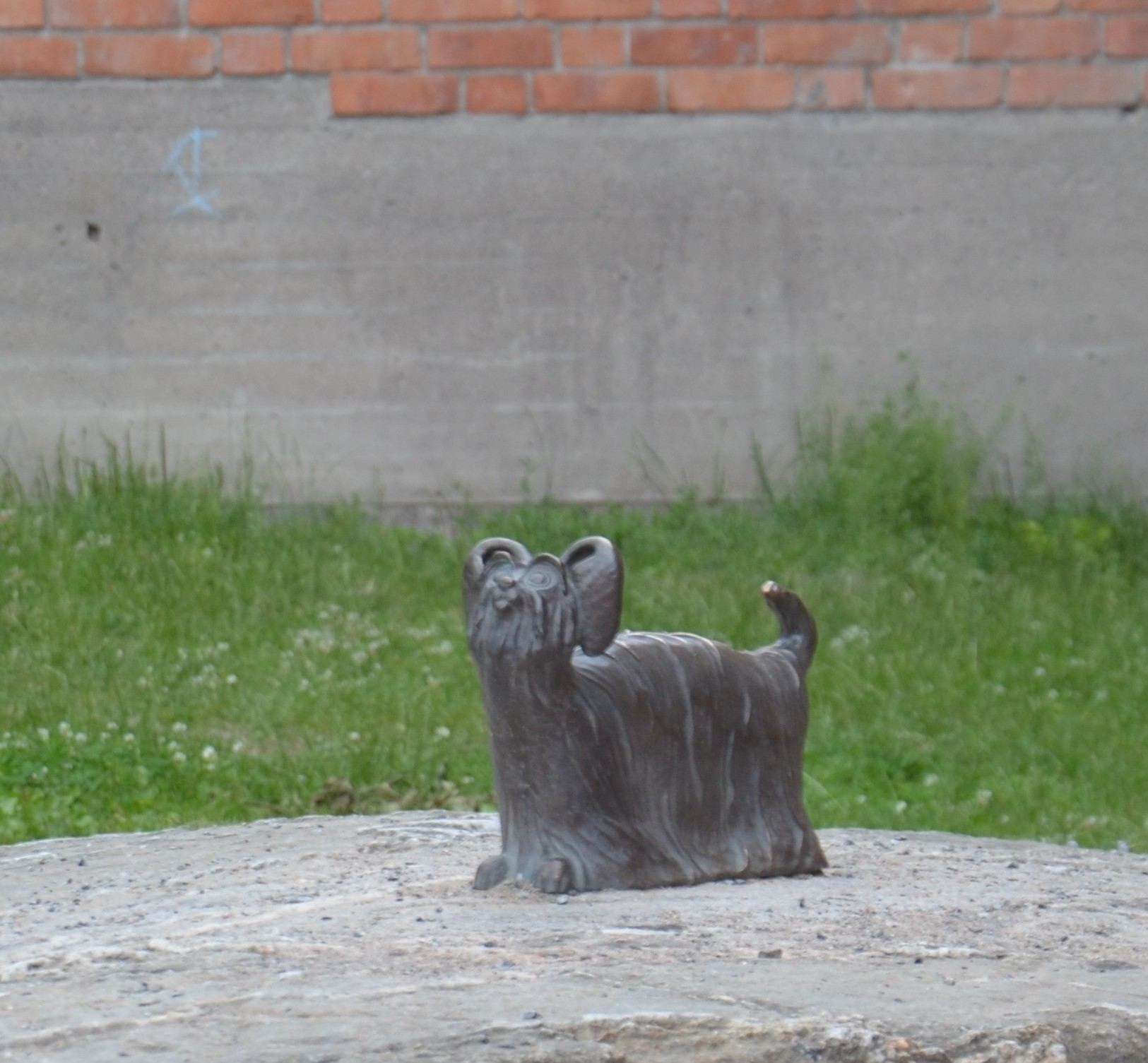 Amalia Årfelts Sally, brons, Hägerstensåsens skola, Stockholm